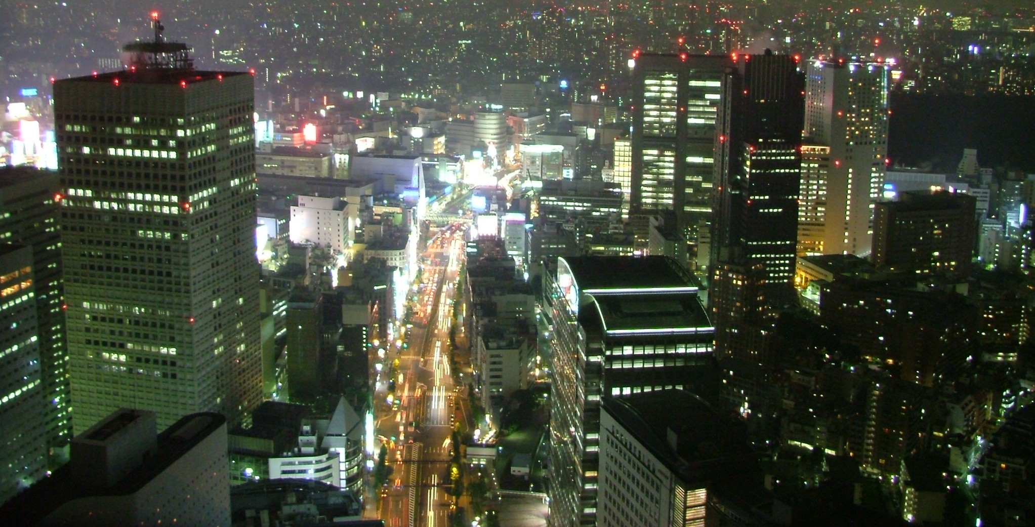 Shinjuku at night, Tokyo.